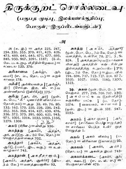 திருக்குறள்-சொல்லடைவு-2-முதற்பக்கம். இந்நூல் 1952 உருவாக்கப்பட்டதால், காப்புரிமை எதுவும் இல்லை. ஏனெனில், ஒரு படைப்பு உருவாக்கப்பட்டு 60 ஆண்டுகள் ஆனால், இந்தியாவில் பொதுவுக்கு உருவதாக இந்திய சட்டம் கூறுகிறது.